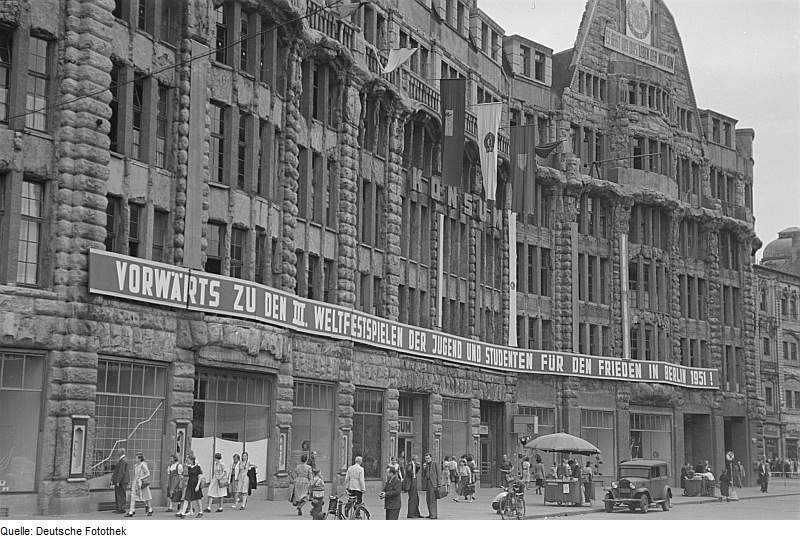 Original image description from the Deutsche Fotothek Sichtwerbung für die III. Weltfestspiele der Jugend und Studenten am Konsum-Warenhaus